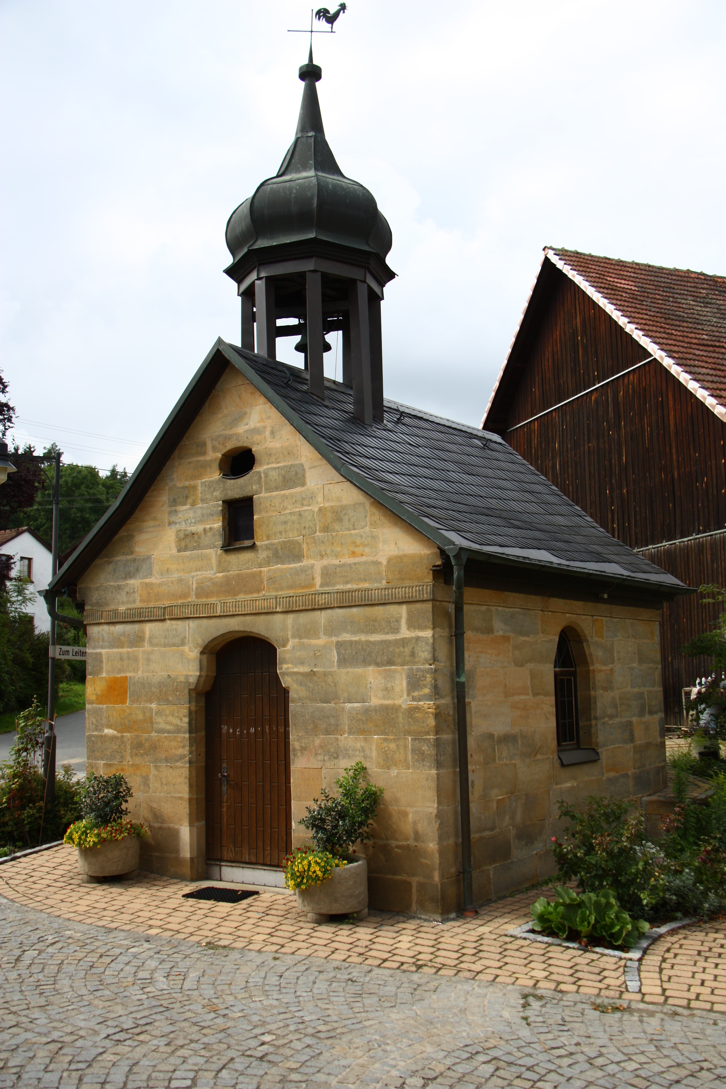 Sandstein Dorfkapelle